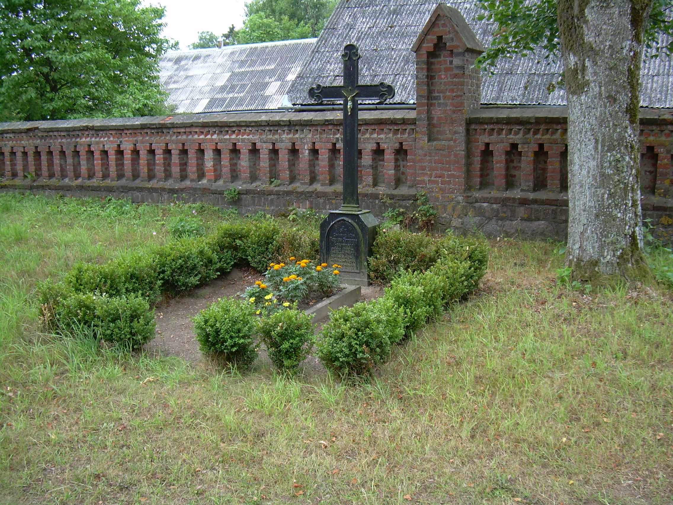 Šateikių Šv. evangelisto Morkaus bažnyčia